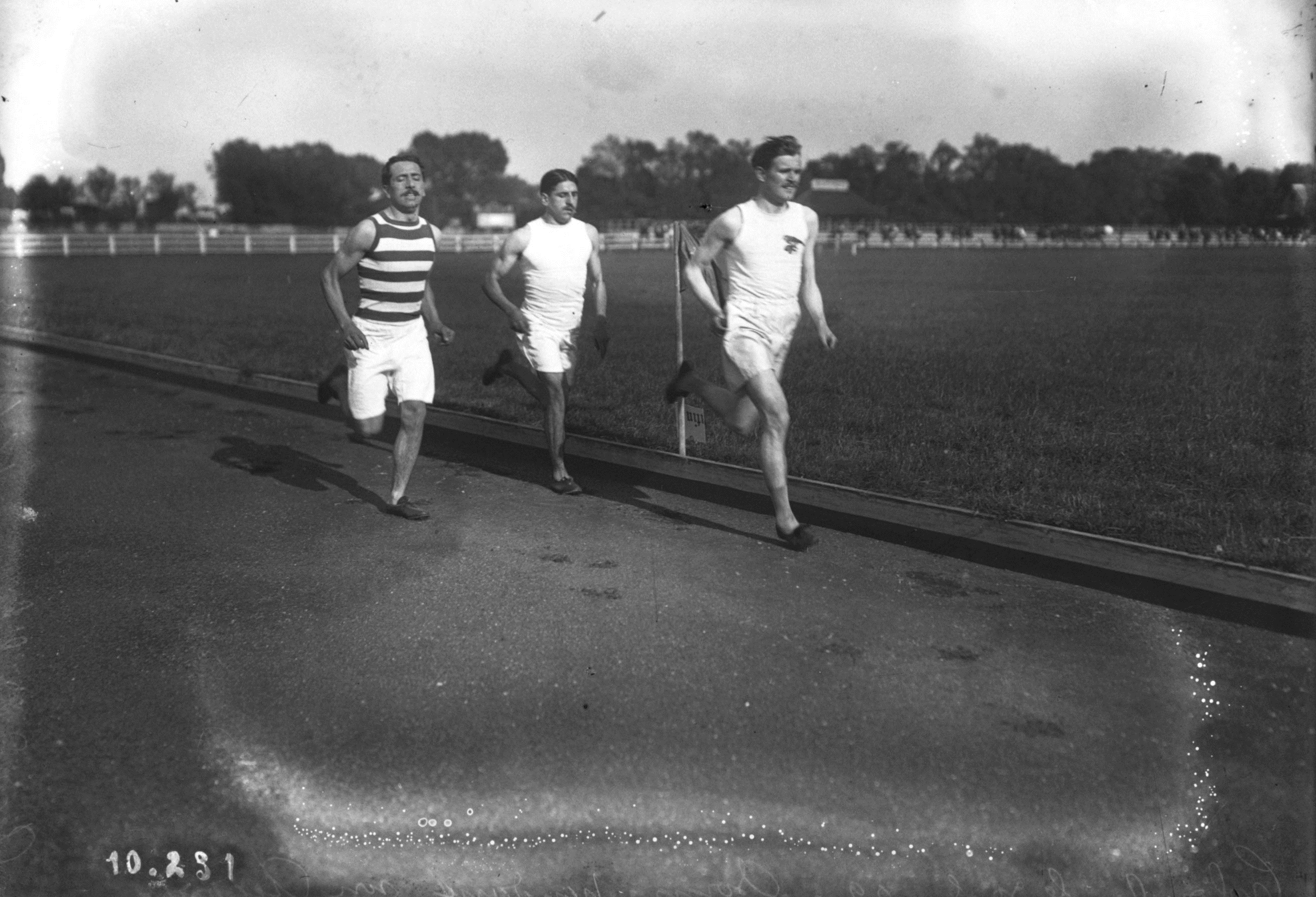 Colombes, le 30-5-1909, [Jean] Bouin [du Racing club de France] pendant son record de l'heure : 18 kilomètres 267 mètres.